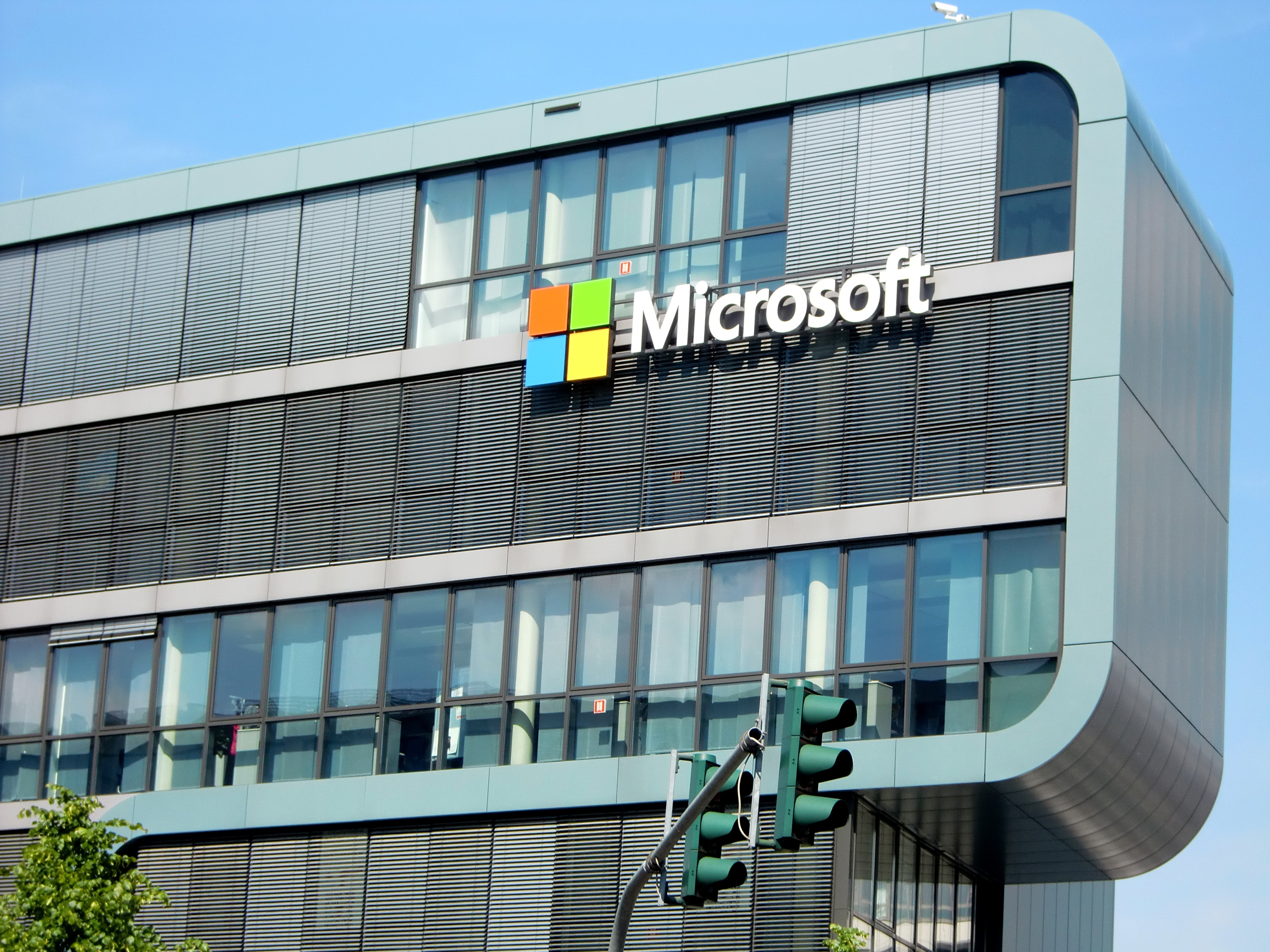 Microsoft buildings Europe